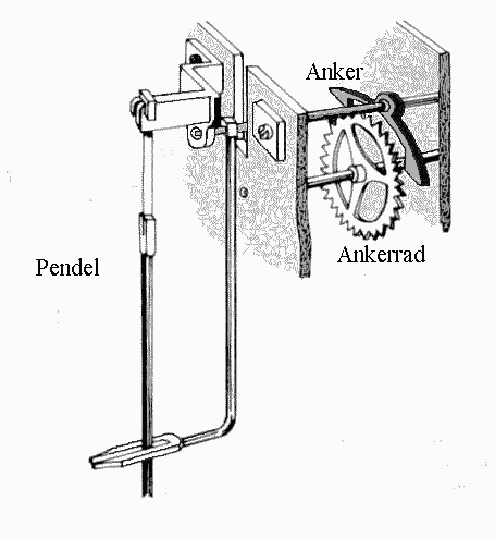 Hakenhemmung für Räderuhren Grafische Überarbeitung: Horst Machmer Horst Machmer